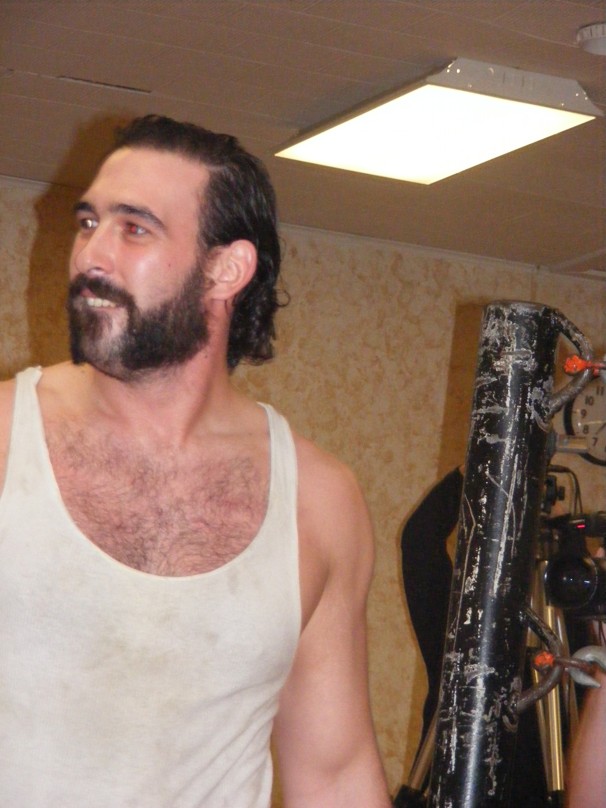 Brodie Lee at a Chikara event